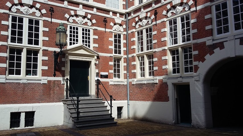 De ingang van het Duitsland Instituut Amsterdam op de binnenplaats van het Oost-Indisch-Huis.